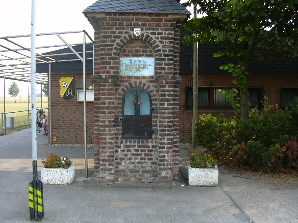 Das Heiligenhäuschen am Sportplatz in Pingsheim